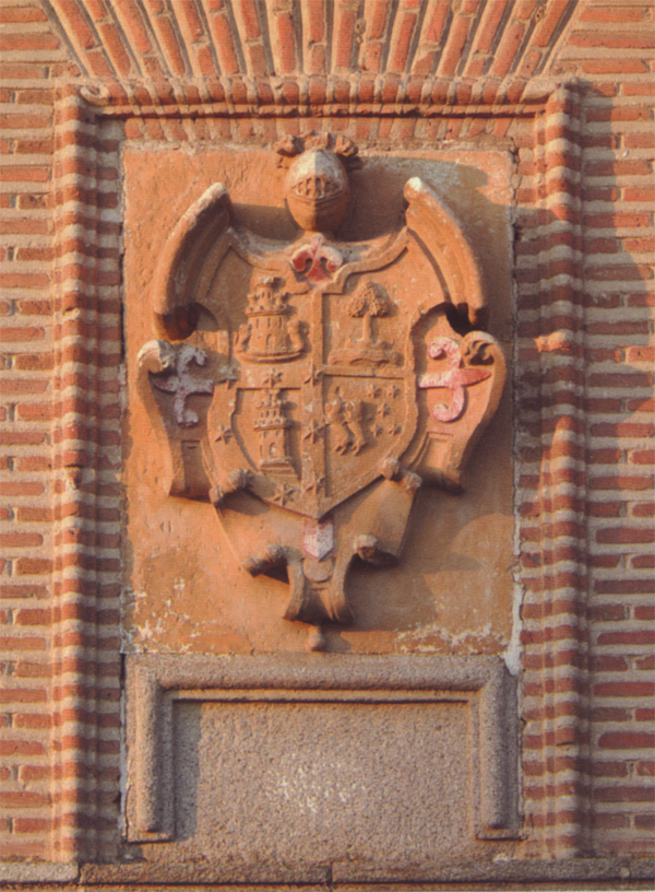 Escudo de la Familia La Torre en Villacastín (Segovia, España)